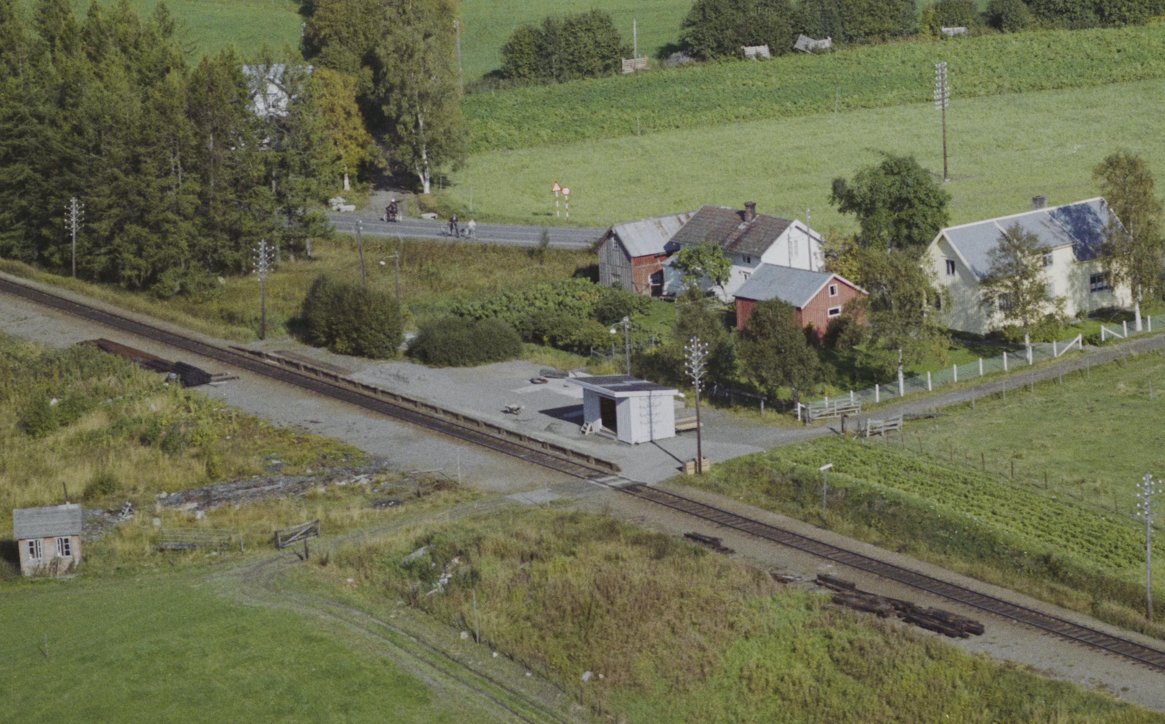 Fleskhus holdeplass på Nordlandsbanen etter at stasjonsbygningen er revet. Foto: Widerøes Flyveselskap.